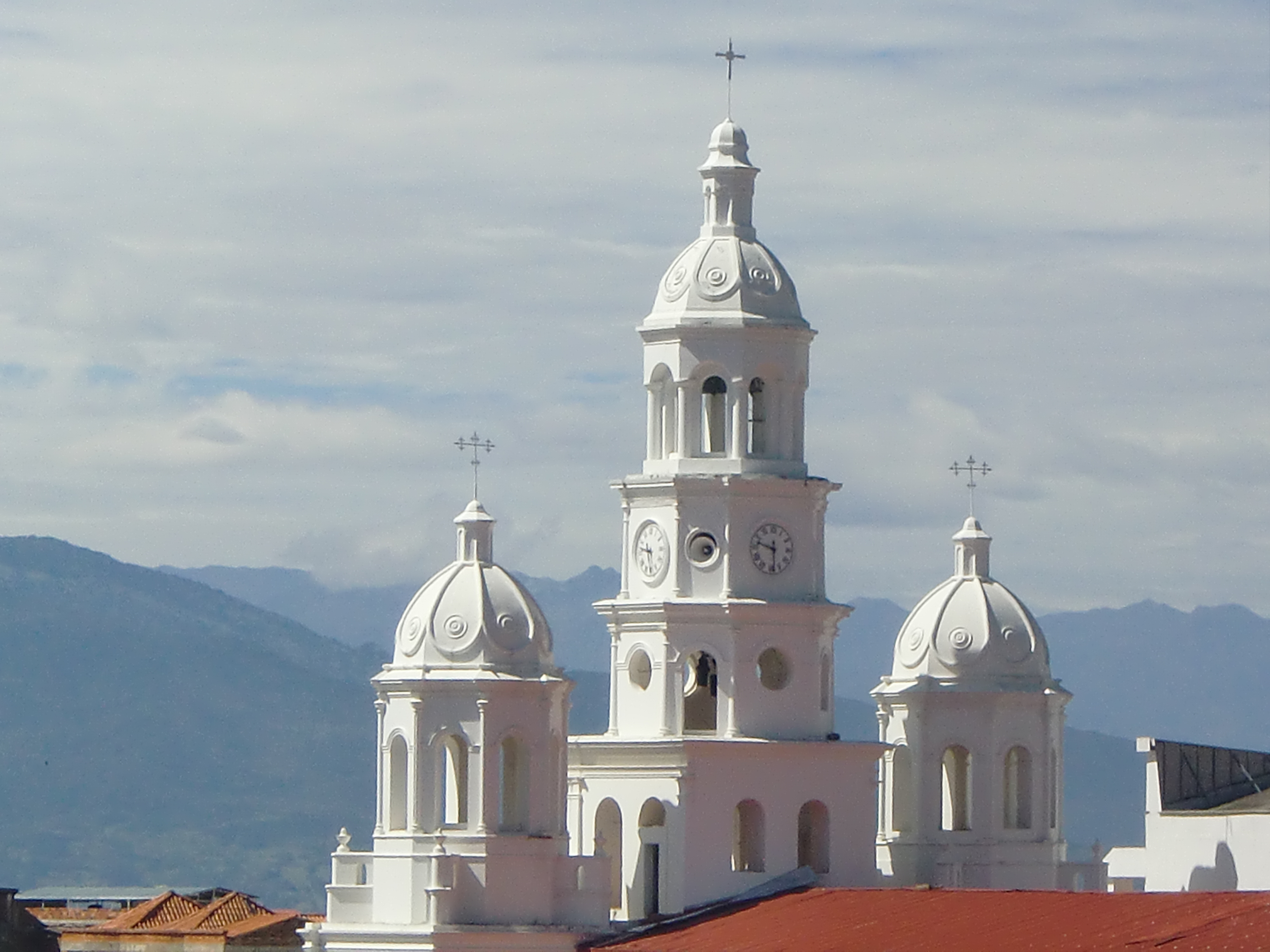 vista posterior